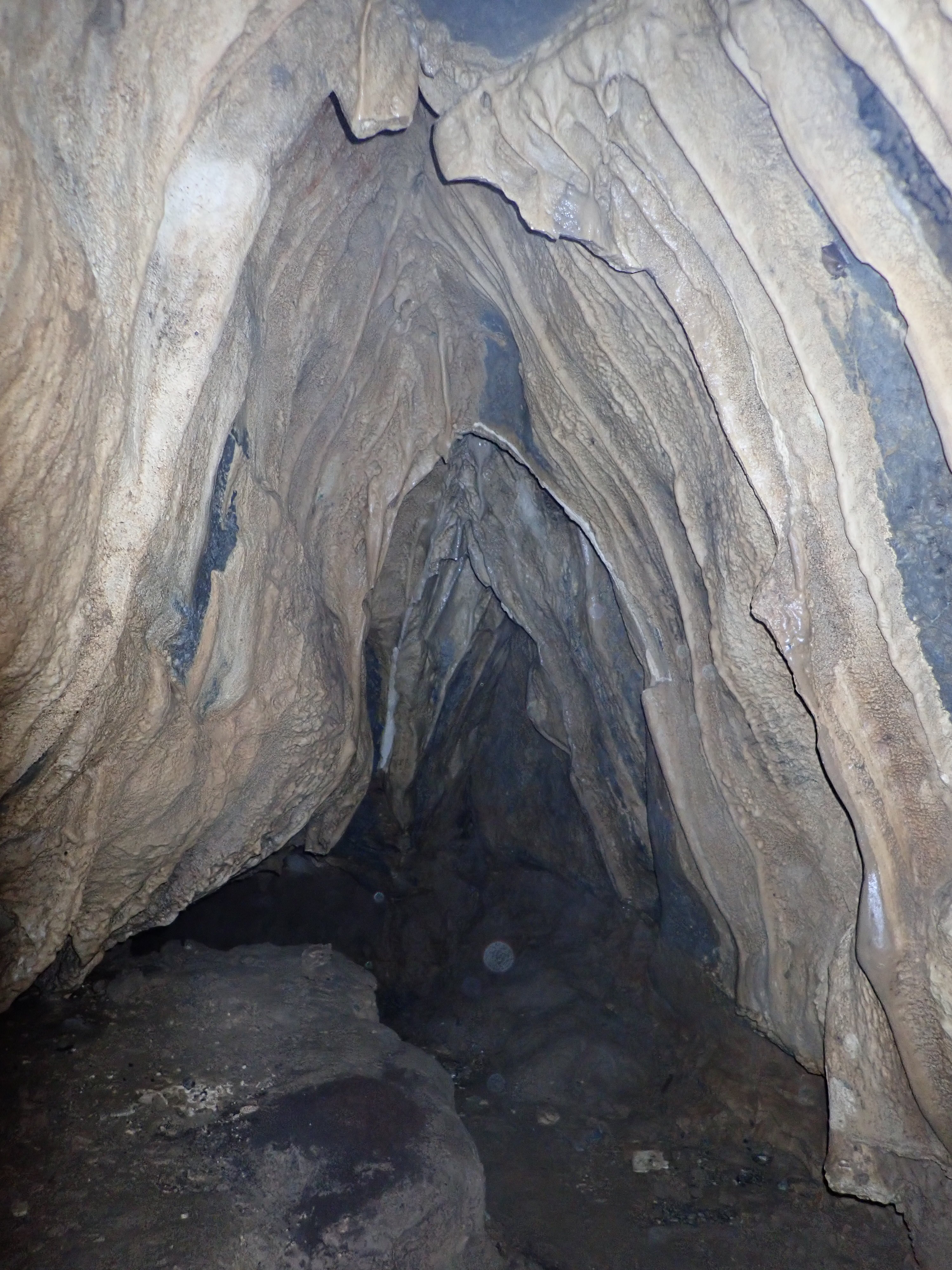 洞壁